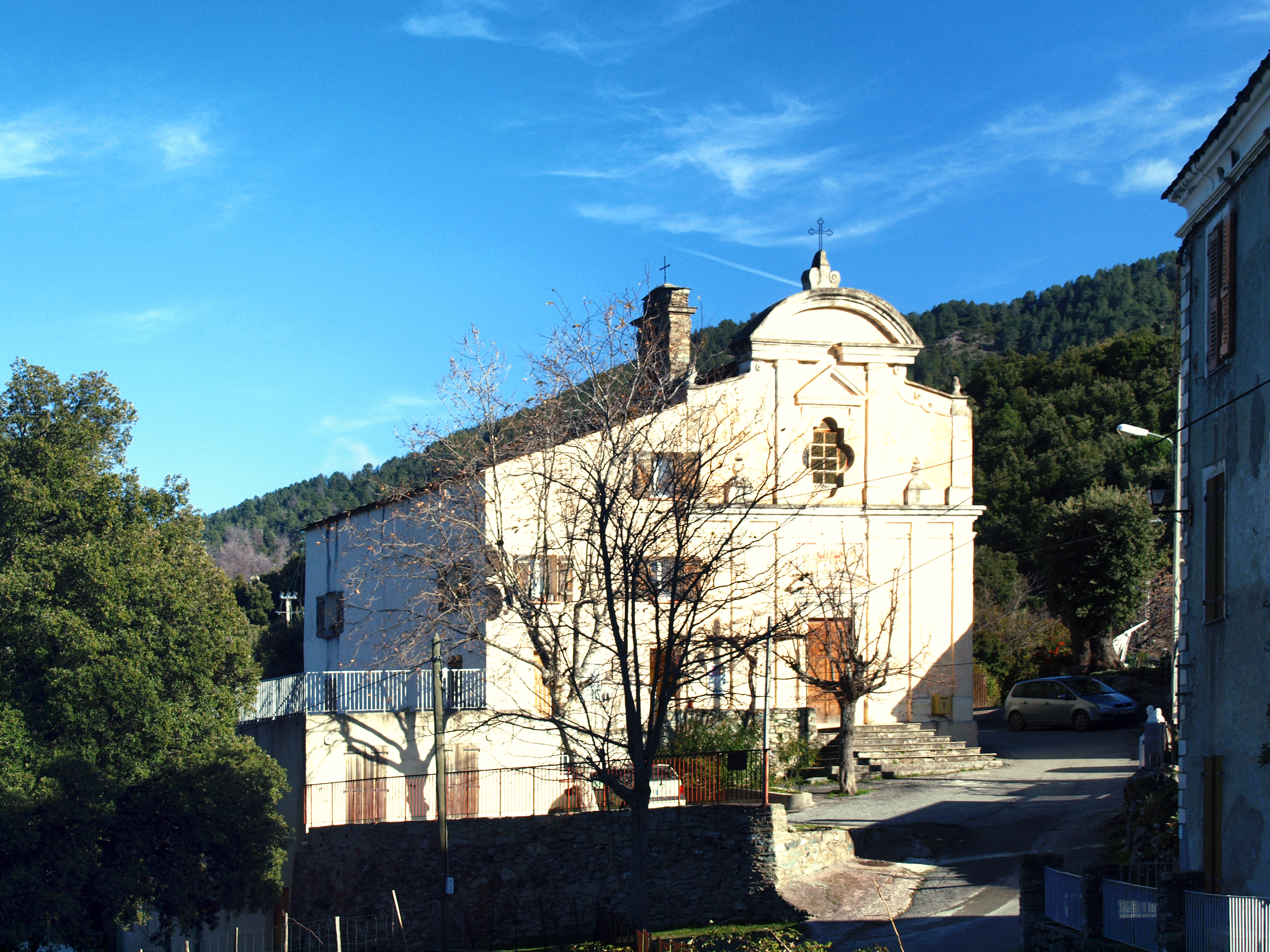 Gavignano, Casaluna (Haute-Corse) - Église paroissiale de l'Annonciation (Annunziata ou A Nunziata), lieu-dit Borgo